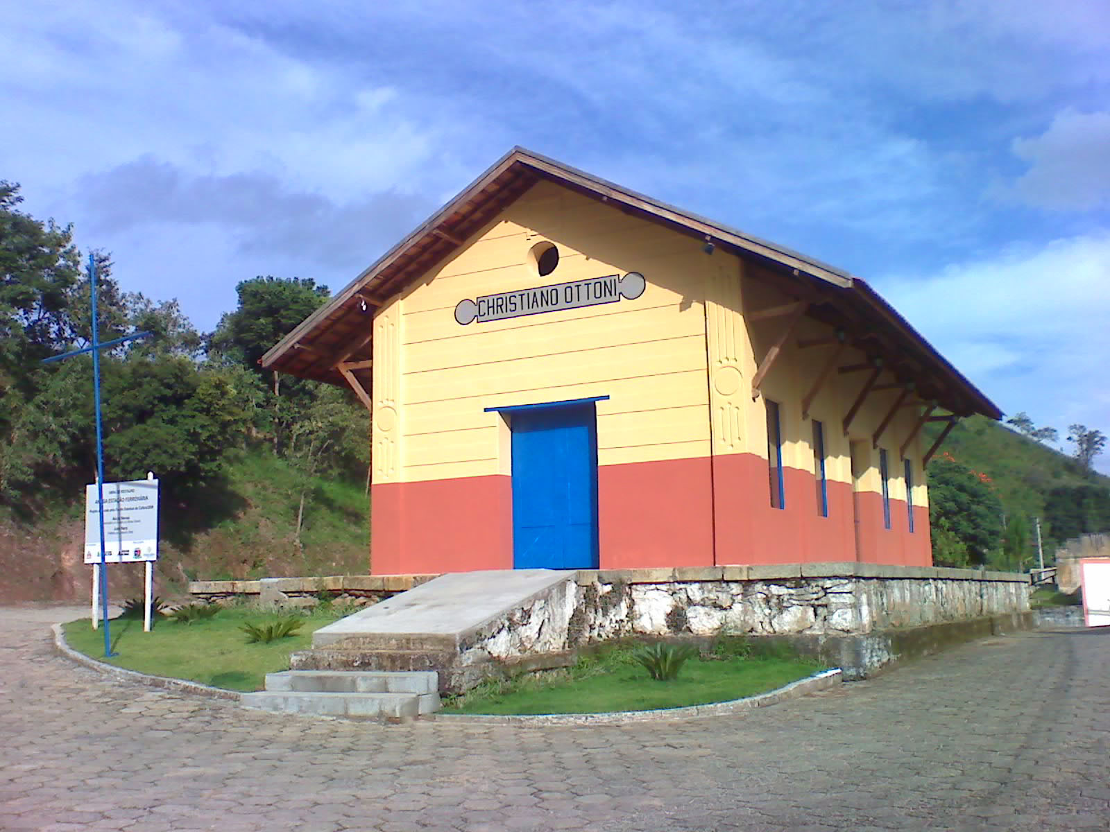 No local está instalada a secretaria municioal de cultura